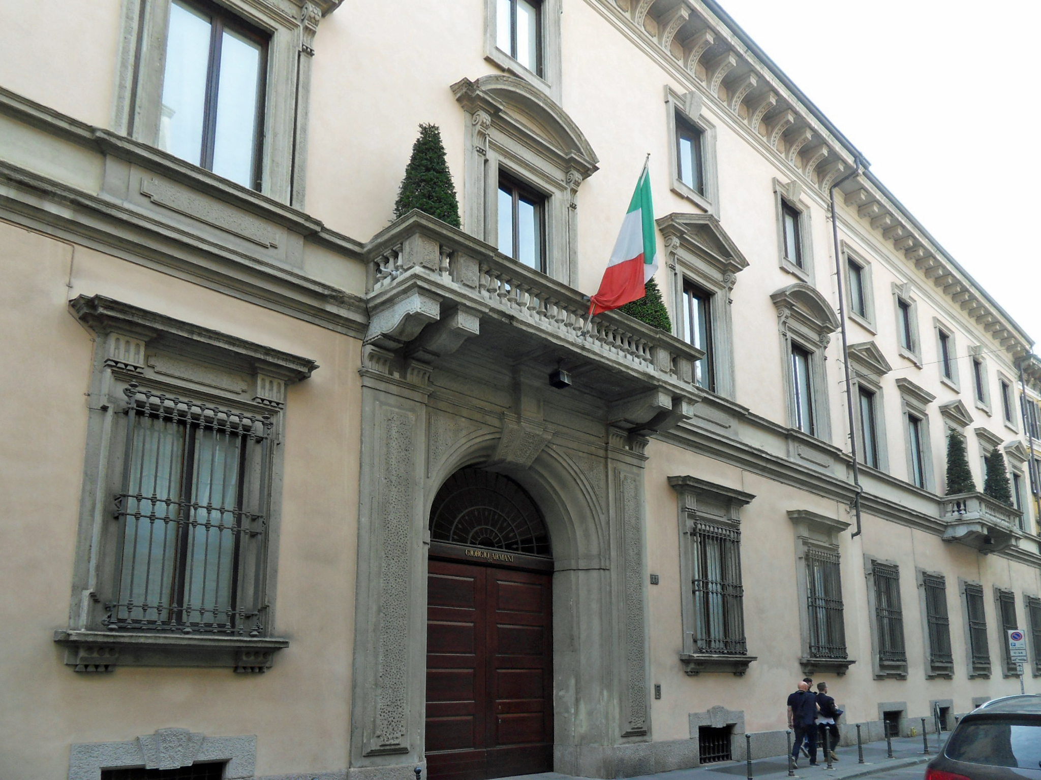 Facciata del Palazzo Orsini di Milano